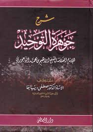 جوهرة التوحيد كتاب